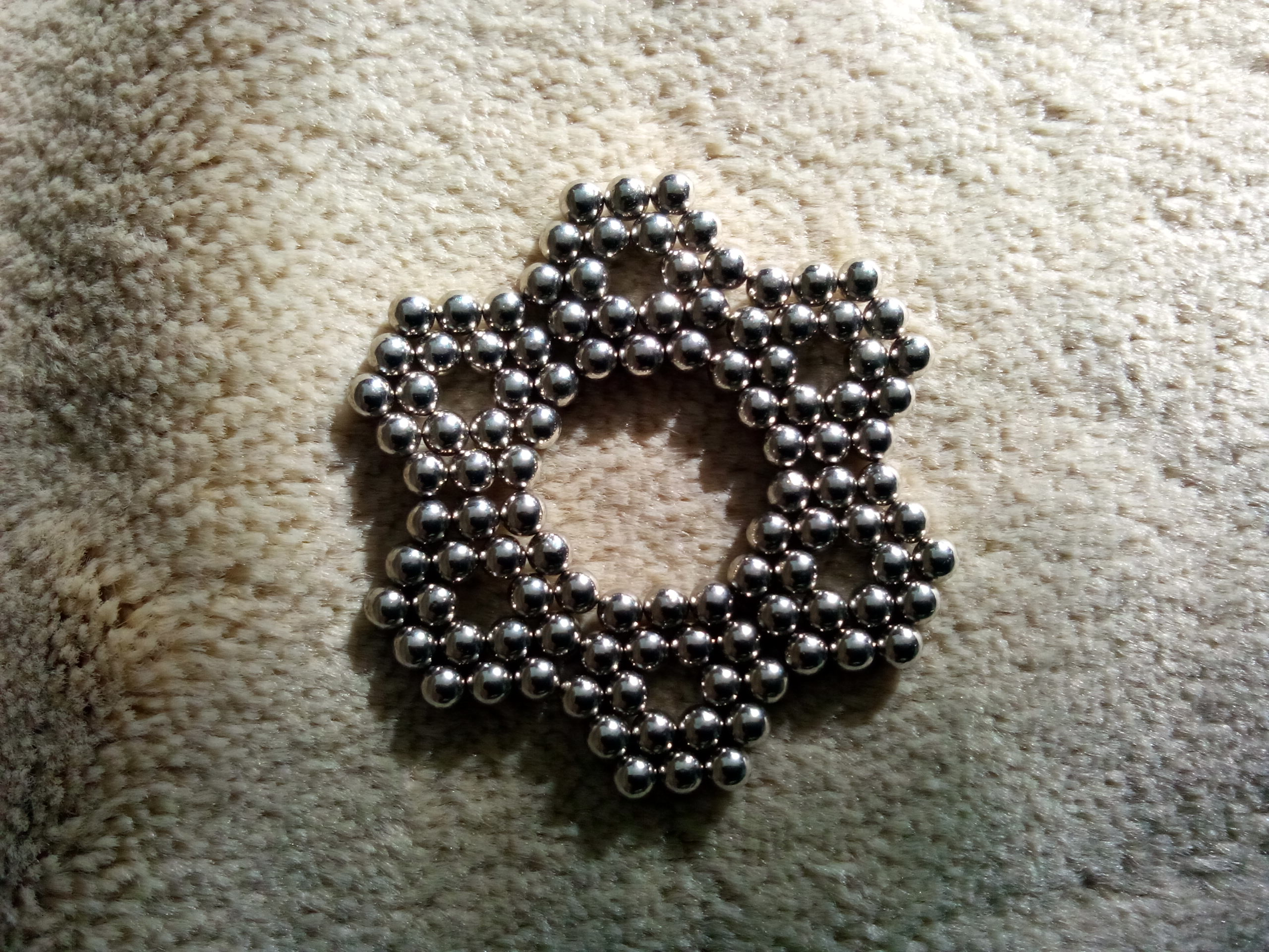 Эту фотографию можно добавить в статью Неокуб.